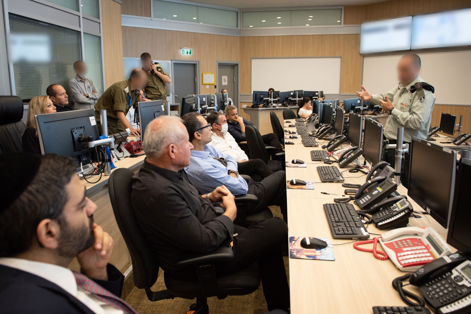 ביקור ועדת החוץ והביטחון במחנה רבין בתל אביב (מחנה מטכ"ל-הקריה). מסביר (בפנים מטושטשות):סגן אלוף פלוני , שורה ראשונה מימין לשמאל: ניצן הורוביץ, עוזי דיין, צבי האוזר, אבי דיכטר ומיכאל מלכיאלי. שורה שנייה מימין לשמאל: ניר ברקת ומיקי חיימוביץ'.